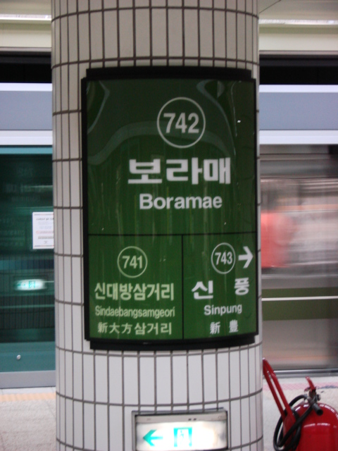 ソウル地下鉄7号線ポラメ駅 駅名標